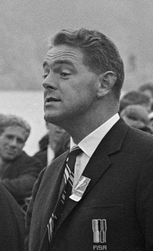 Europese Roeikampioenschappen te Duisburg, Russische vier zonder stuurman.